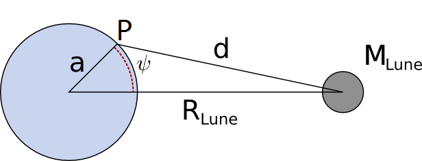 Schéma explicatif du potentiel générateur